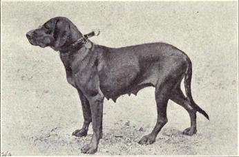 Hanovrian Limer from 1915